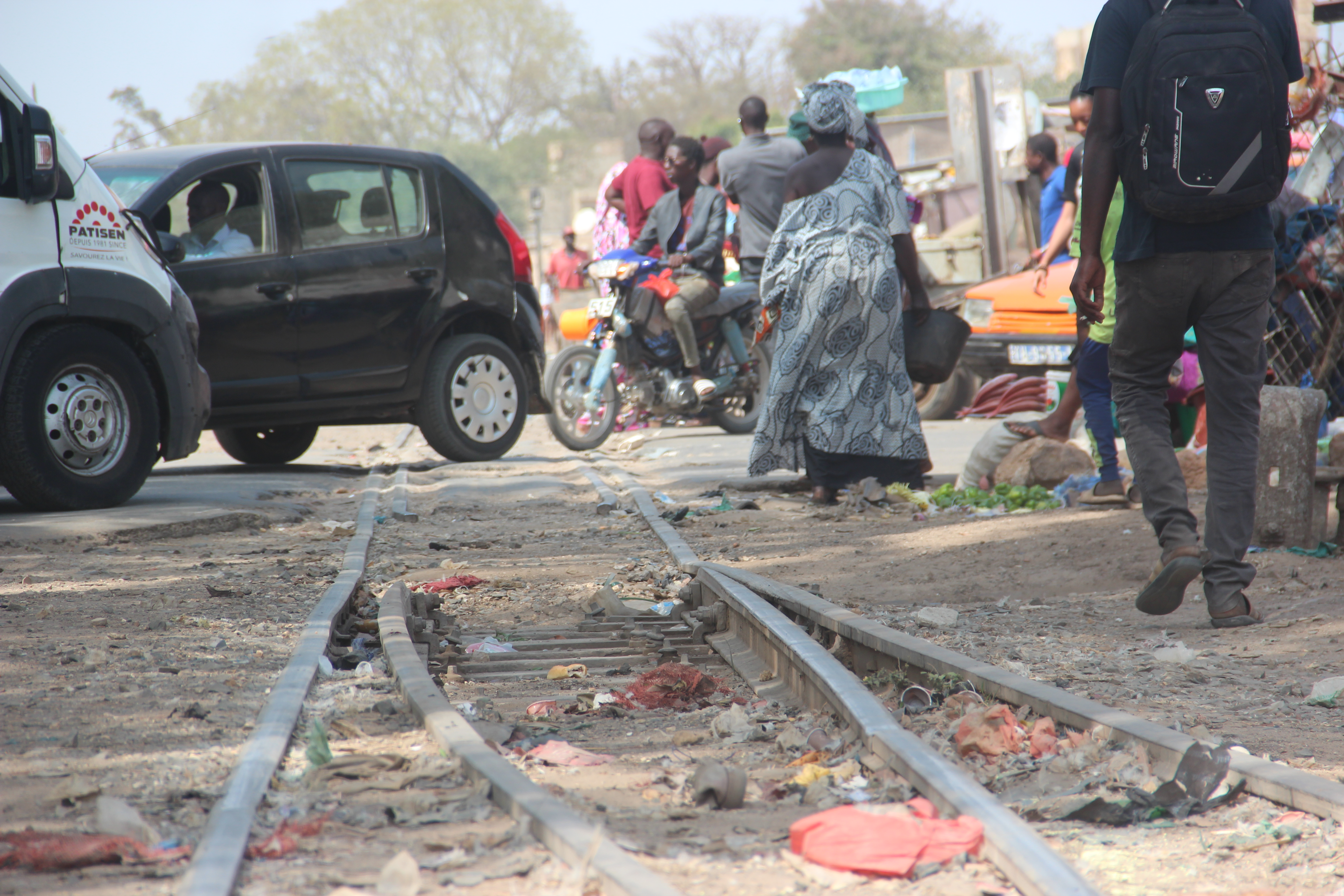 "Passage à niveau" à Thiès, Sénégal. This is an image with the theme "Africa on the Move or Transport" from: Senegal